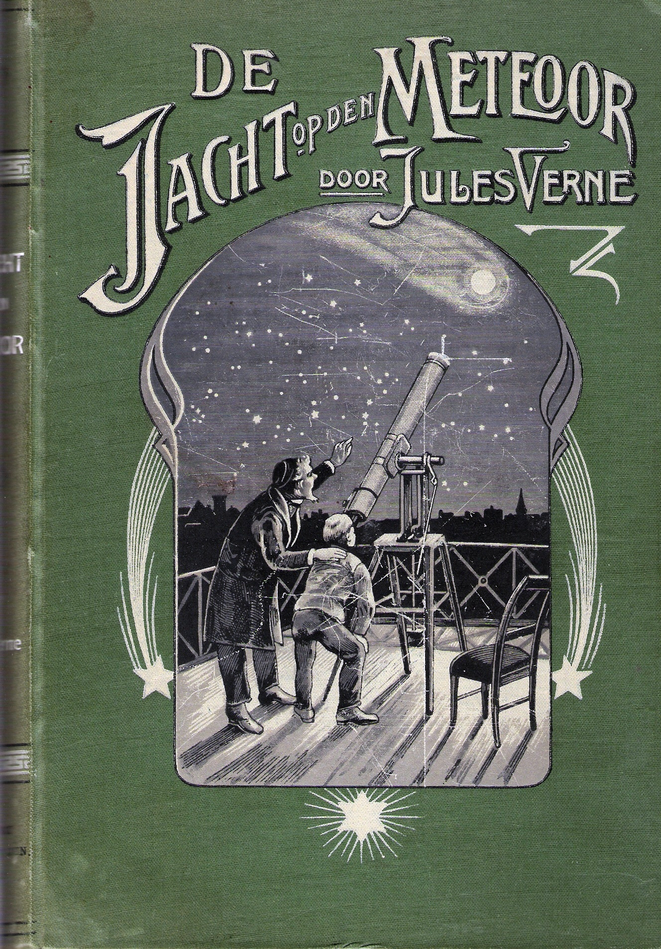 Jules Verne: De Jacht op den Meteoor um 1900, Einbanddeckel, niederländische Ausgabe